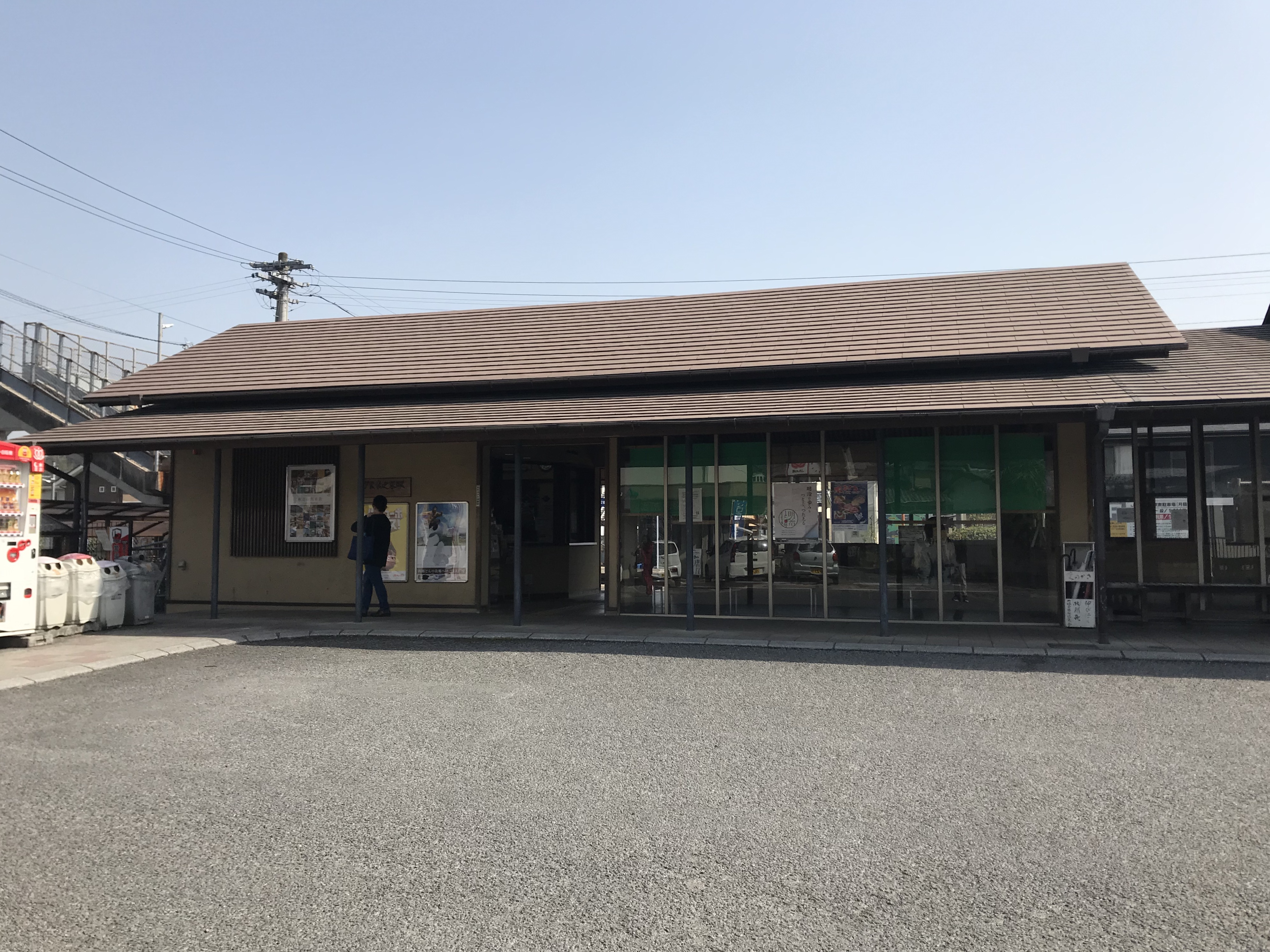 向之原駅駅舎